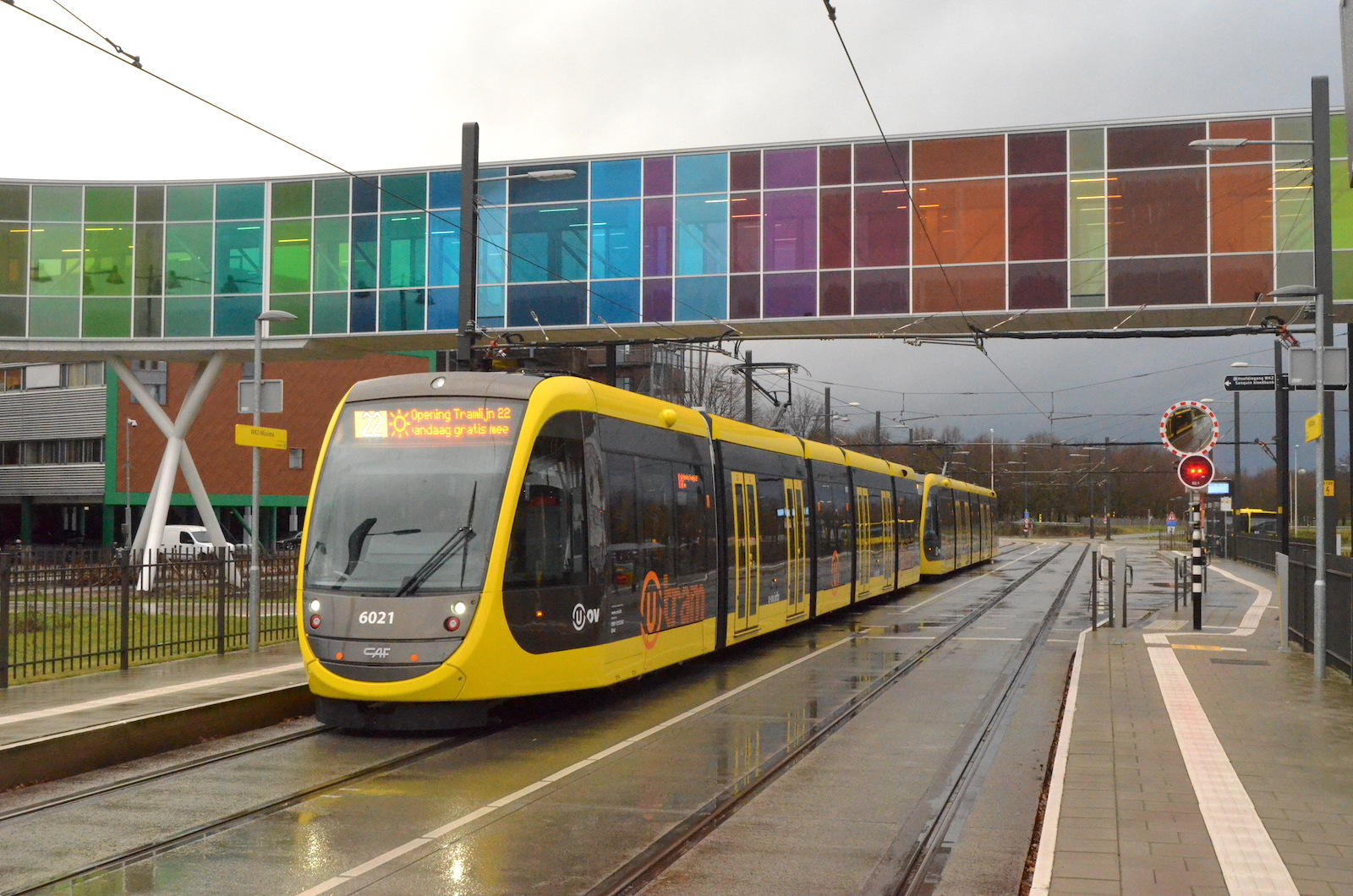 Tramstel 6021 van de Uithoflijn op de halte WKZ / Maxima, op de openingsdag; 14 december 2019. Foto: Erik Swierstra.